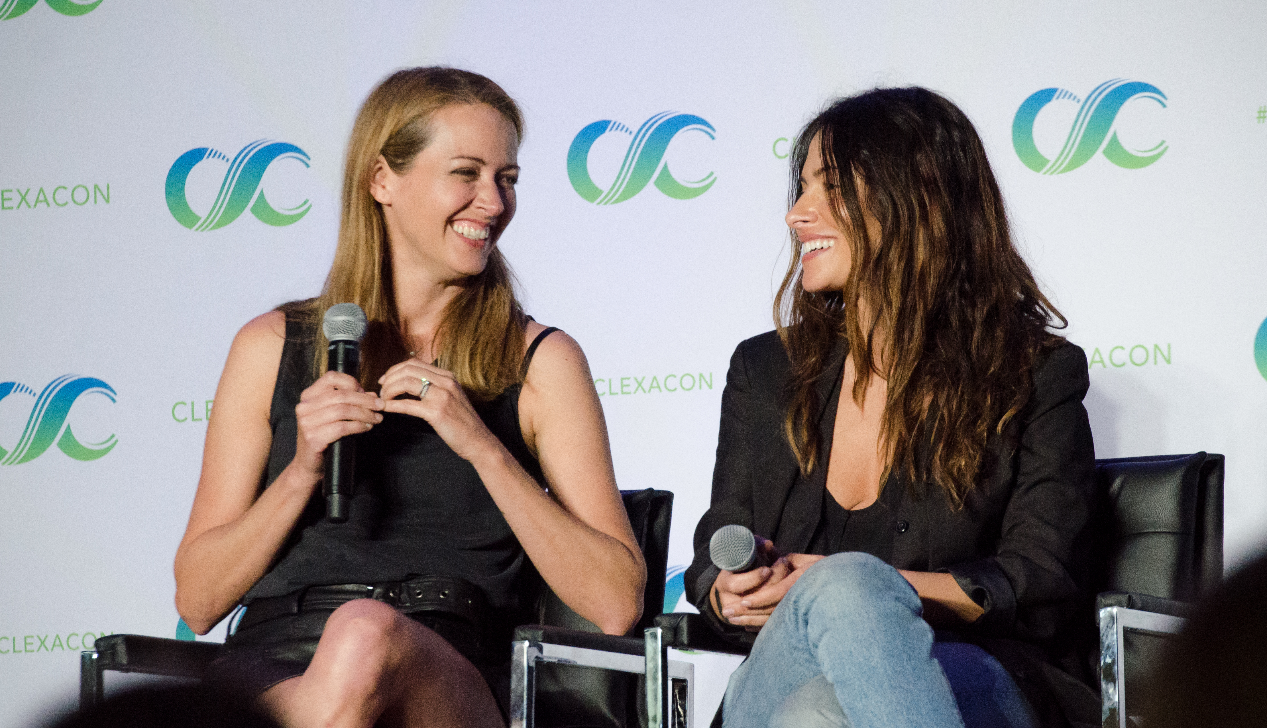 Amy & Sarah [2]